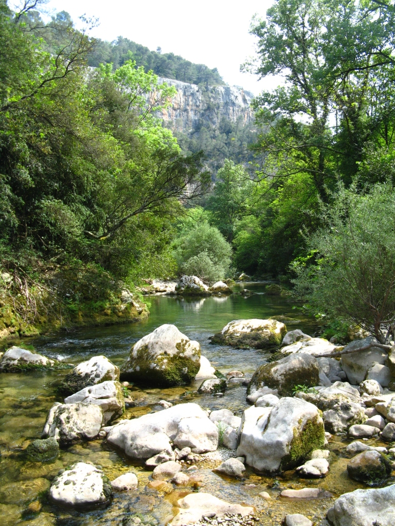 Gorges de la Siagne, près de Saint-Cézaire-sur-Siagne (Alpes-Maritimes, France)